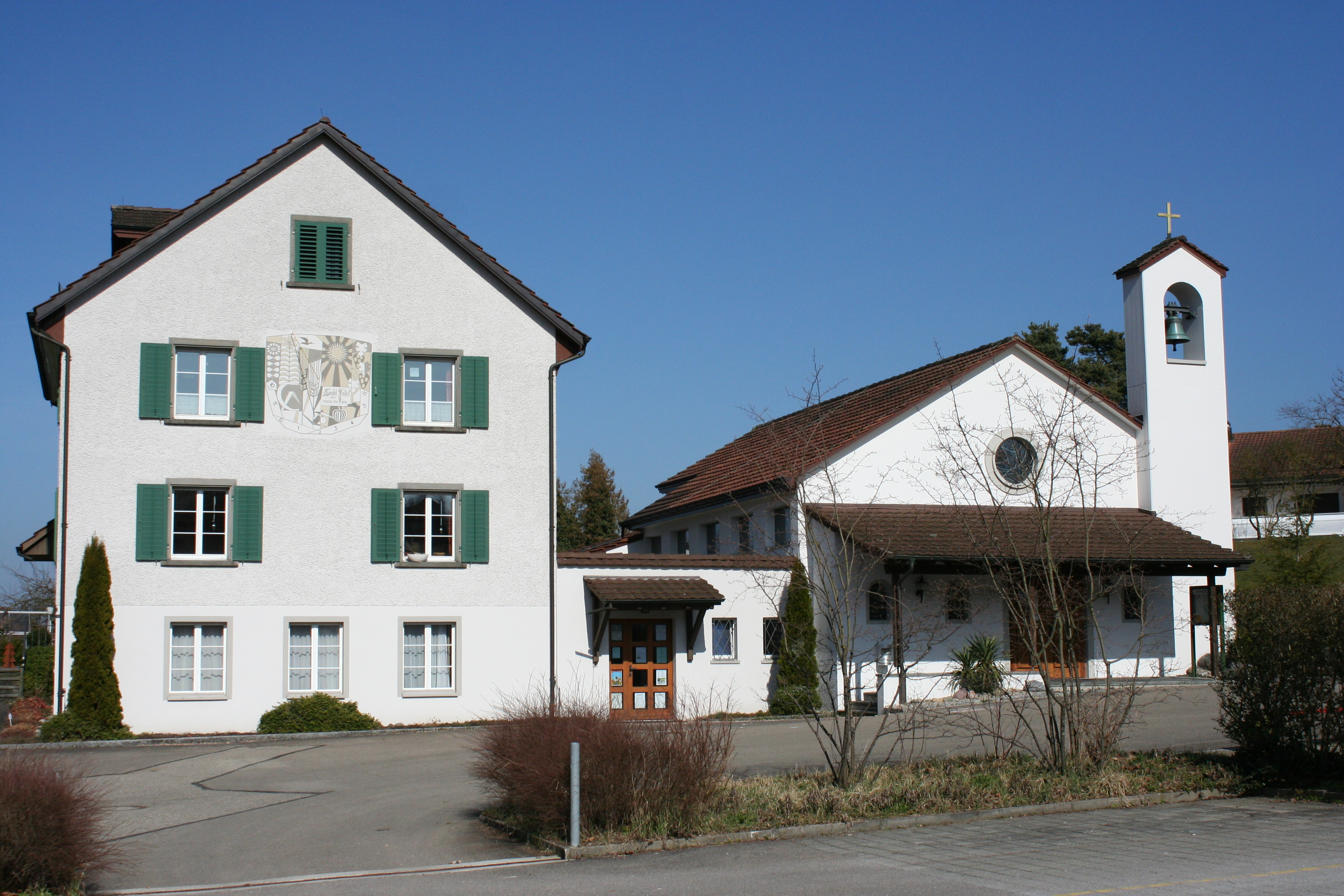 Römisch-katholische Kirche St. Josef Rickenbach-Sulz